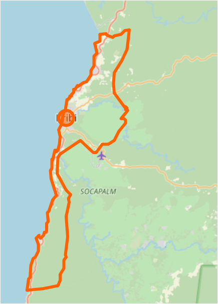 Limites communales de Kribi CUK au Cameroun, OSM. This map may be incomplete, and may contain errors. Don't rely solely on it for navigation.